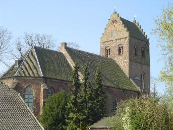 kerk van geesteren, zie de hen en haan en de trapjesgevel met zadeldak dit is een foto die iedereen wel eens heeft gemaakt. De kerk vanaf de achterkant gefotografeerd. De hen en de haan zijn duidelijk zichtbaar